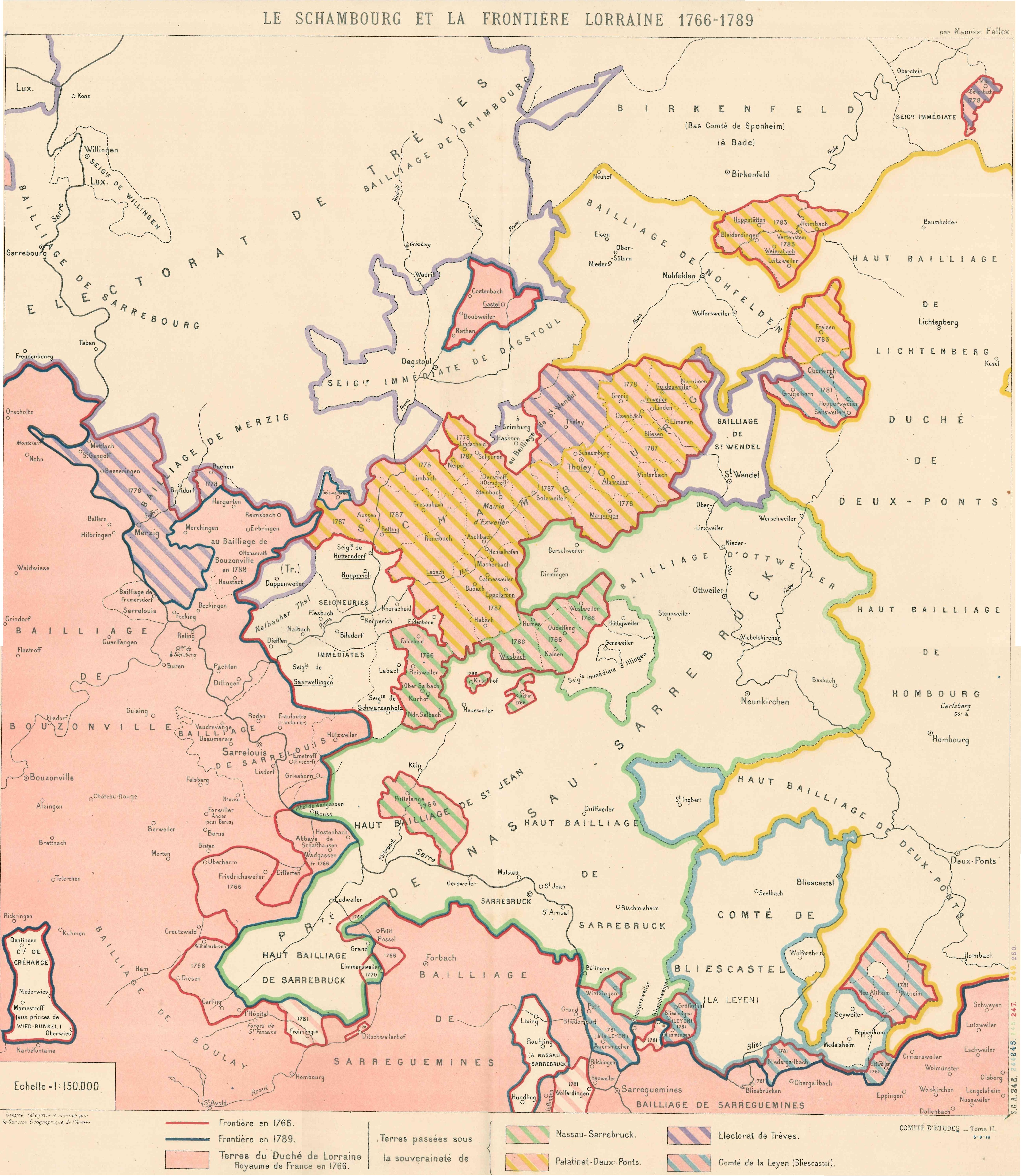 Übersichtskarte der Region rund um den Schaumberg und die Grenzverschiebung von 1766 nach 1789 (durch Grenzregulierungsvertrag 1787)